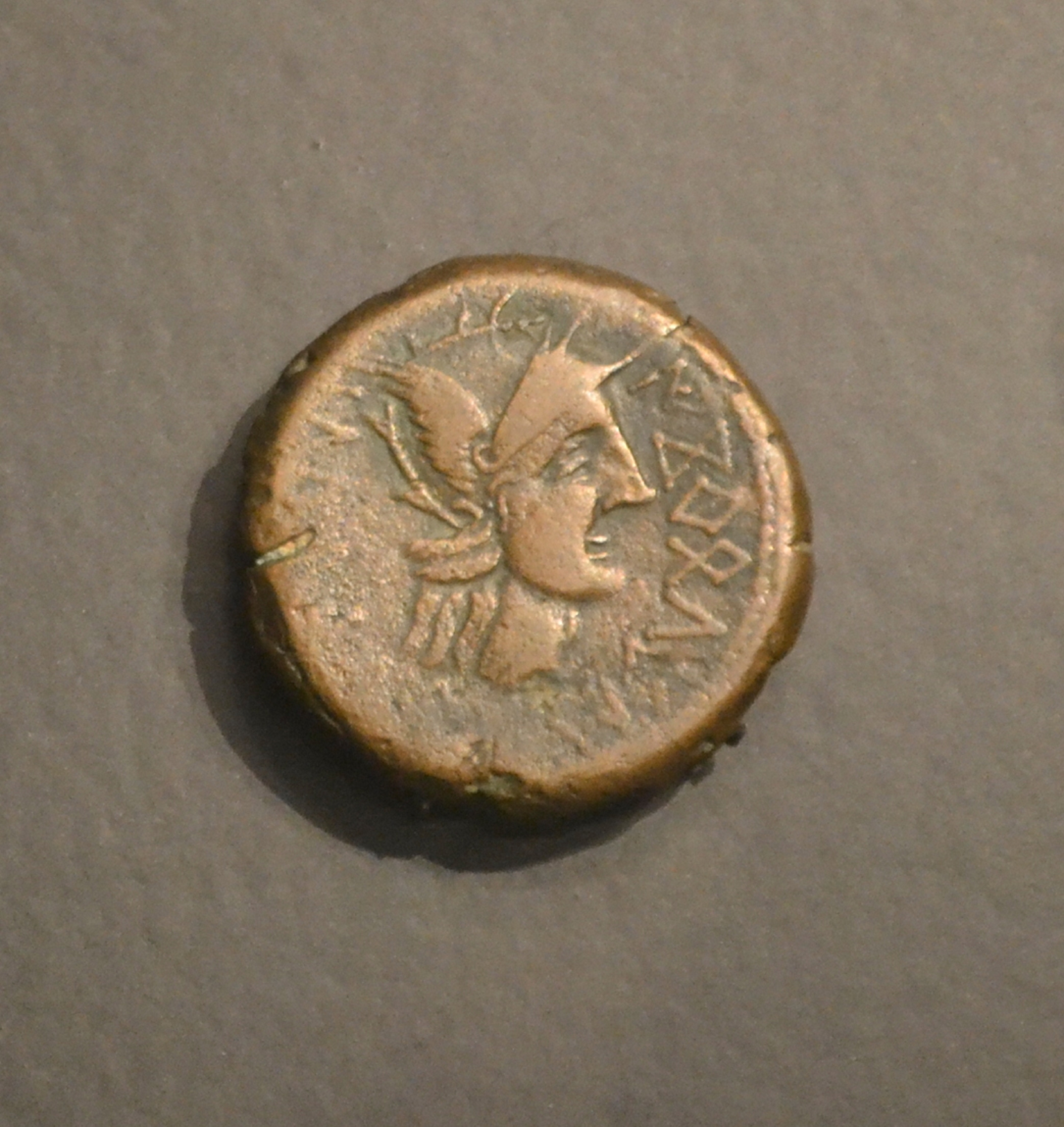 Moneda de bronce de Kelin (Los Villares, Caudete de las Fuentes). Museo de Prehistoria de Valencia.